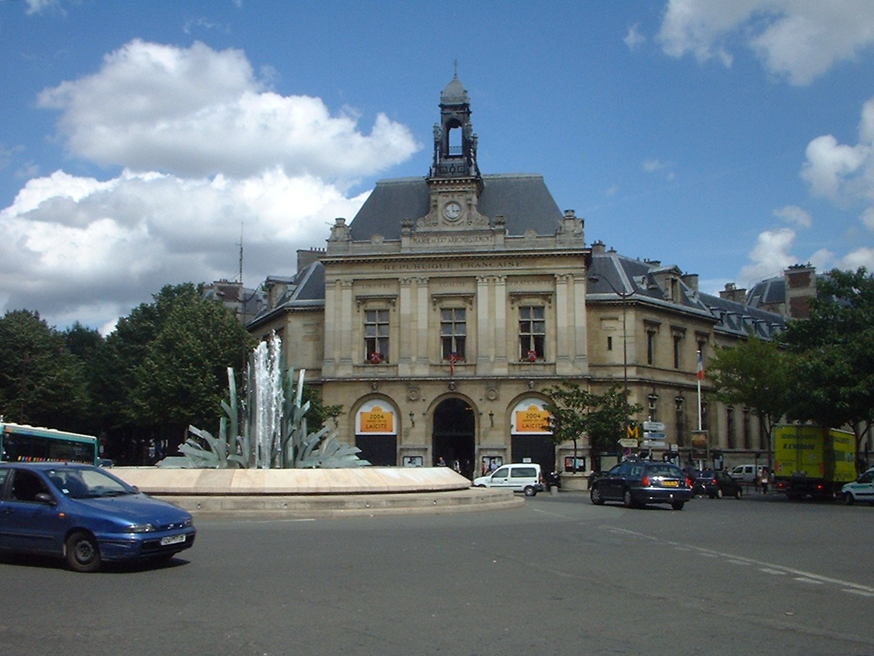 Mairie annexe du XXème arrondissement de Paris